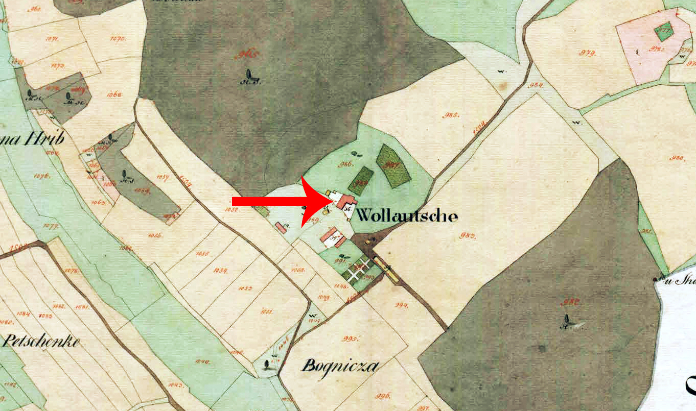 Dvorec Volavče na Franciscejskem katastru za Kranjsko, 1823-1869